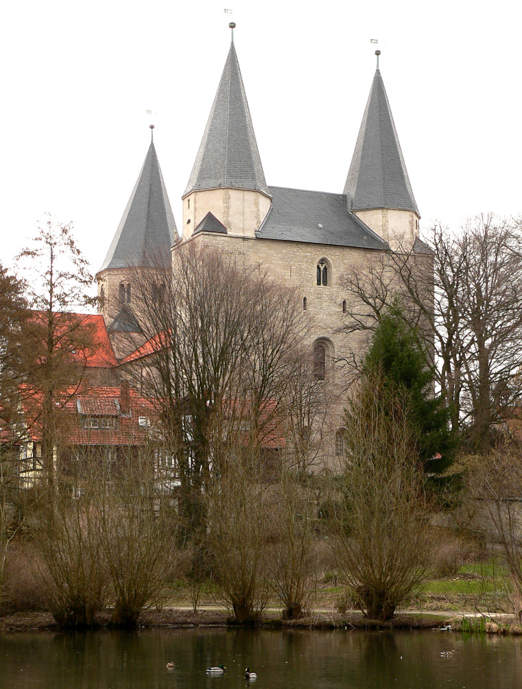 Stiftskirche St. Peter und Paul (Kaiserdom) Königslutter Foto aufgenommen von Benutzer Axel Hindemith, April 2006